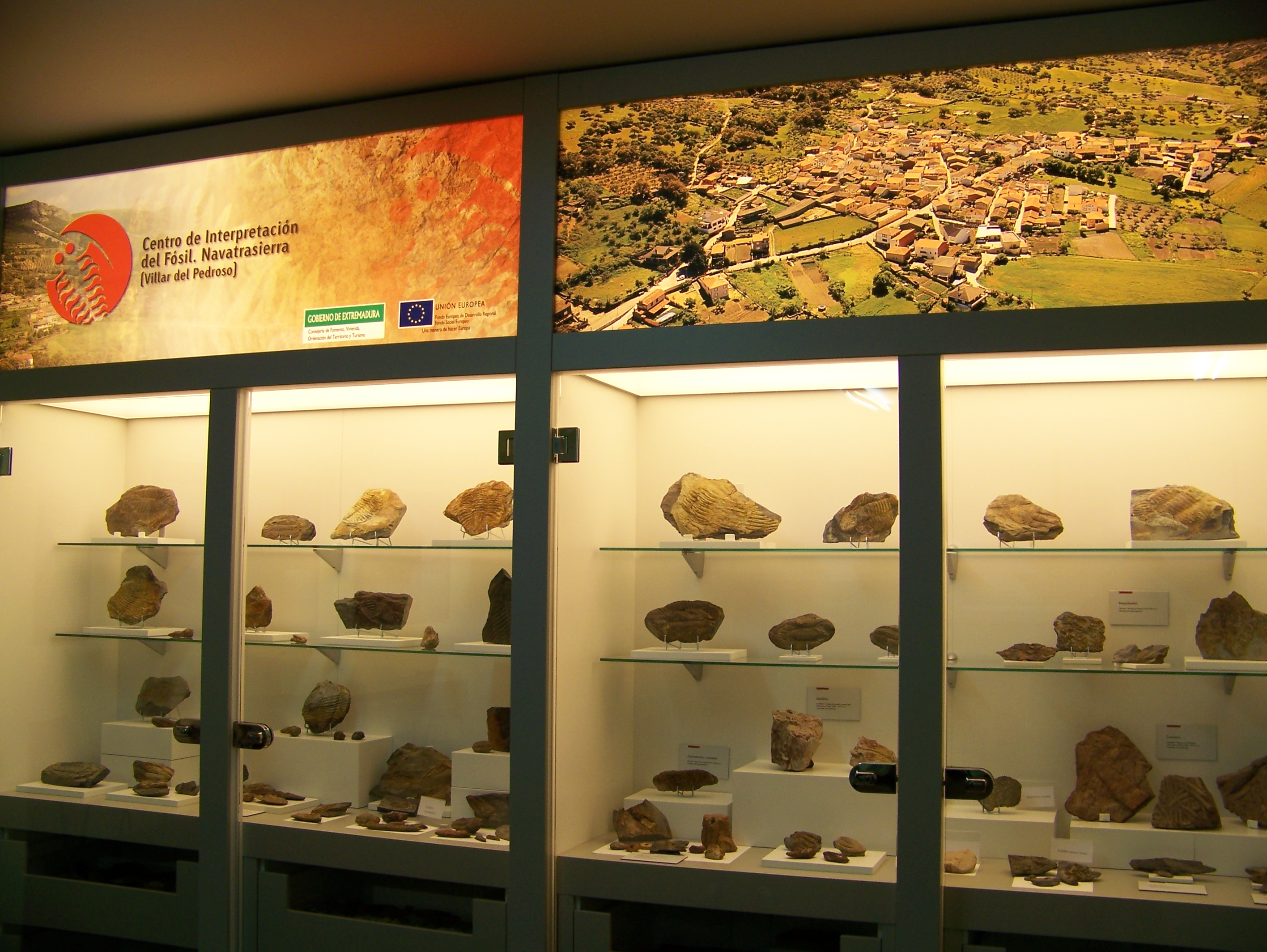 En el Centro de Interpretación de los Fósiles de Navatrasierra se exponen fósiles de primitivos animales marinos que vivían en los fondon marinos hace mas de 450 millones de años.